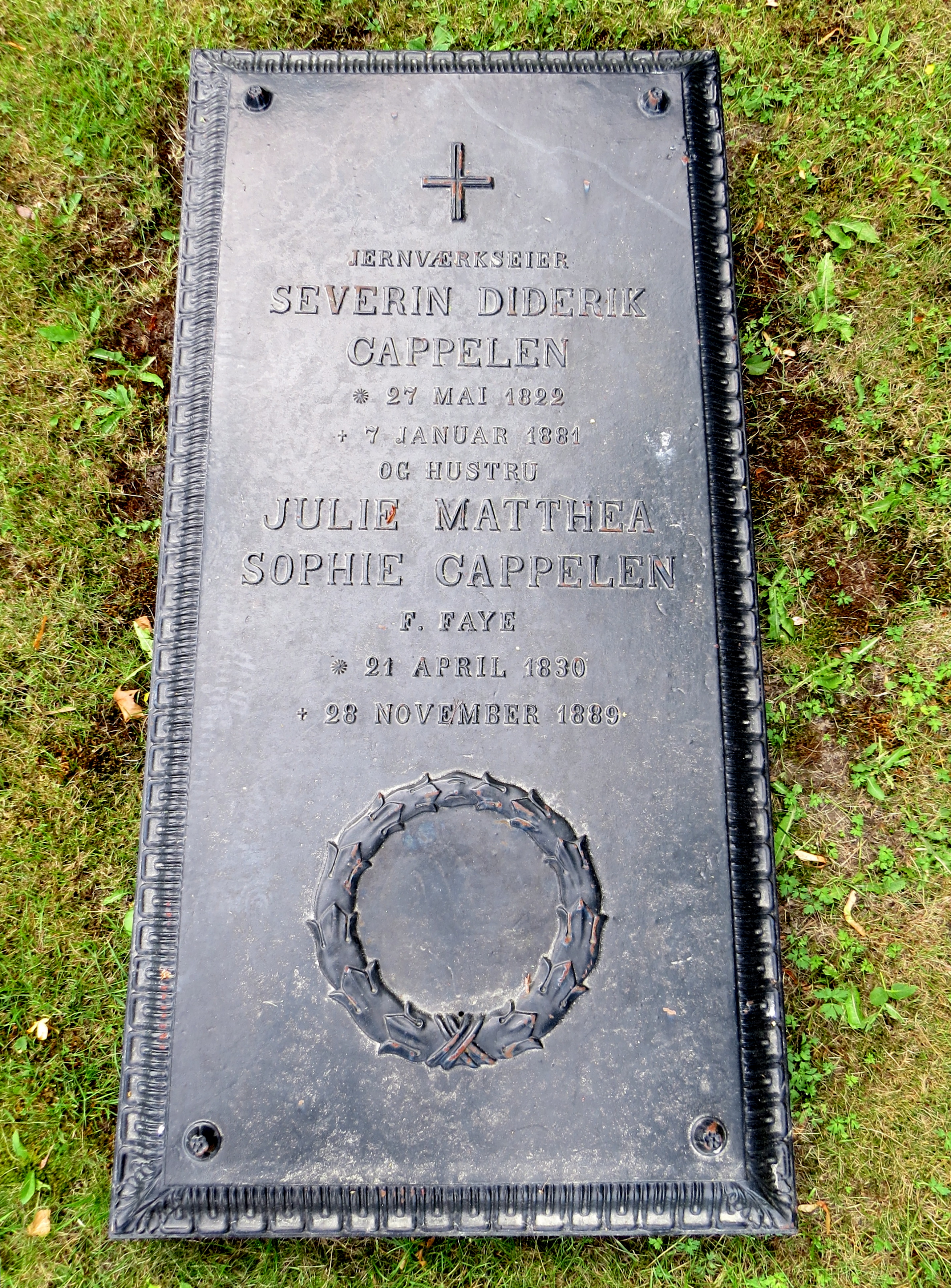 Jernværkseier Severin Diderik Cappelen * 27 Mai 1822 † 7 Januar 1881 og hustru Julie Matthea Sophie Cappelen f. Faye * 21 April 1830 † 28 November 1889 Gravminde ved Hollen (Holla) Gamle Kirke, Ulefos